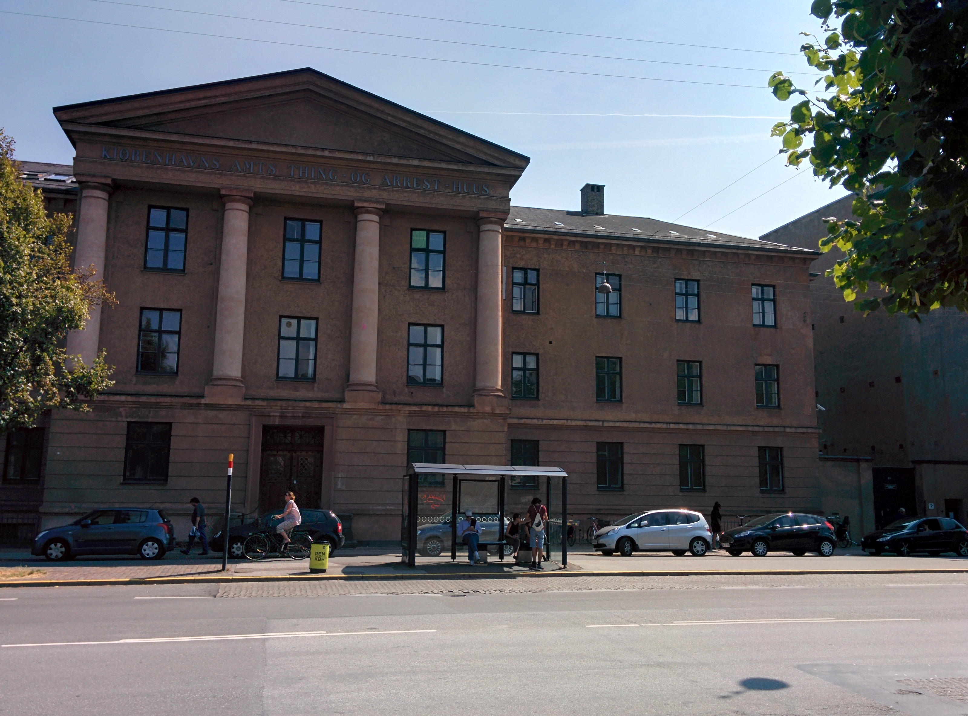 IMG_20140801_135056